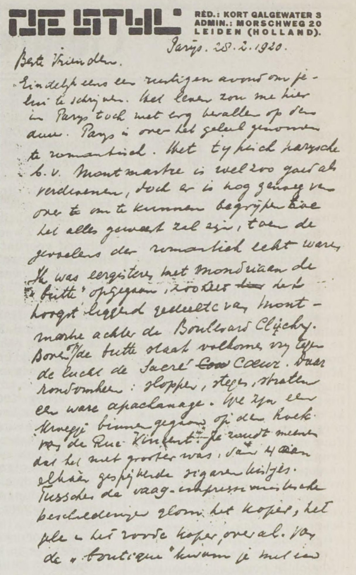 Brief aan Evert en Thijs Rinsema. Afkomstig uit Het Vrije Volk, 3 januari 1986, p. 13.